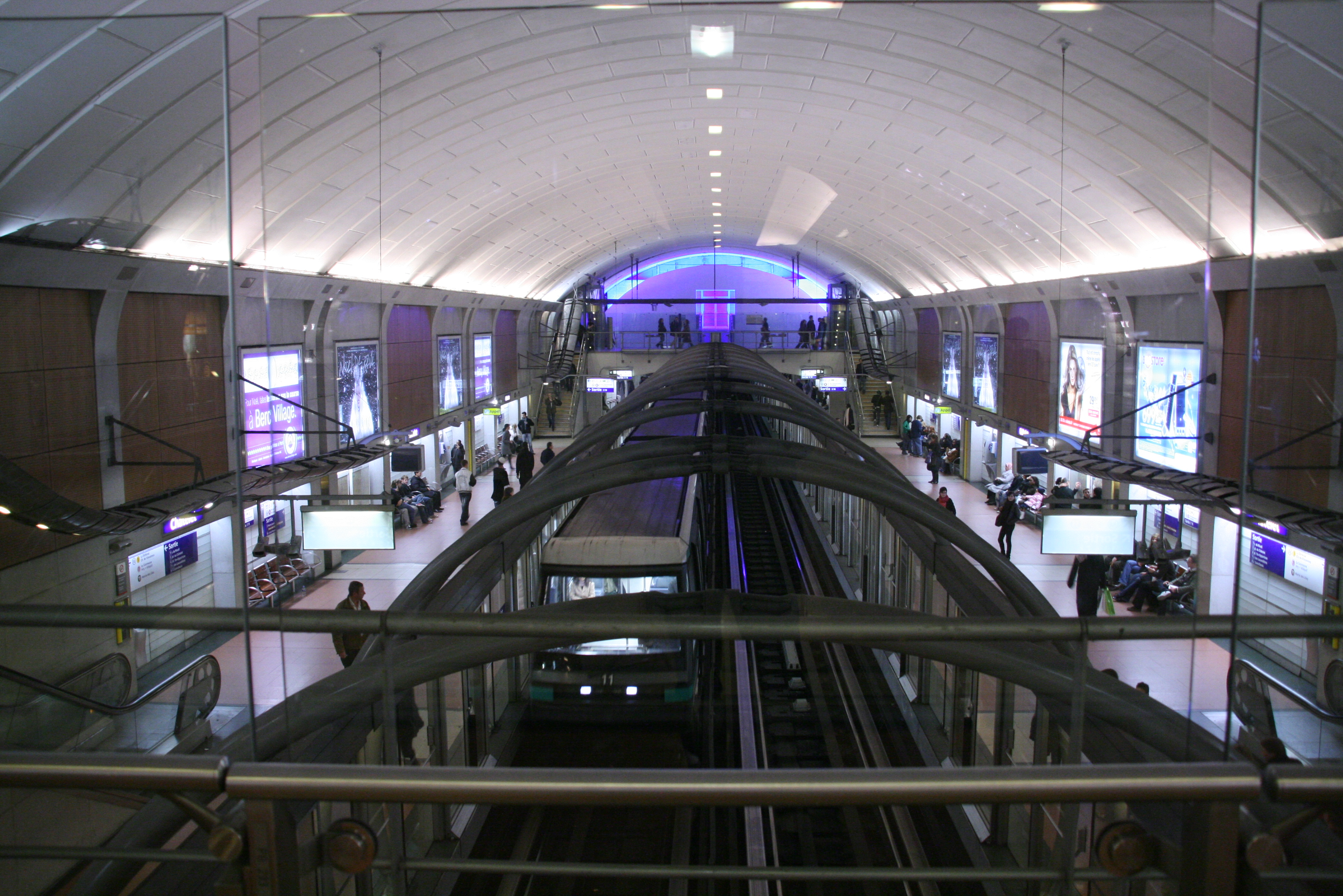 Châtelet line 14 metro station